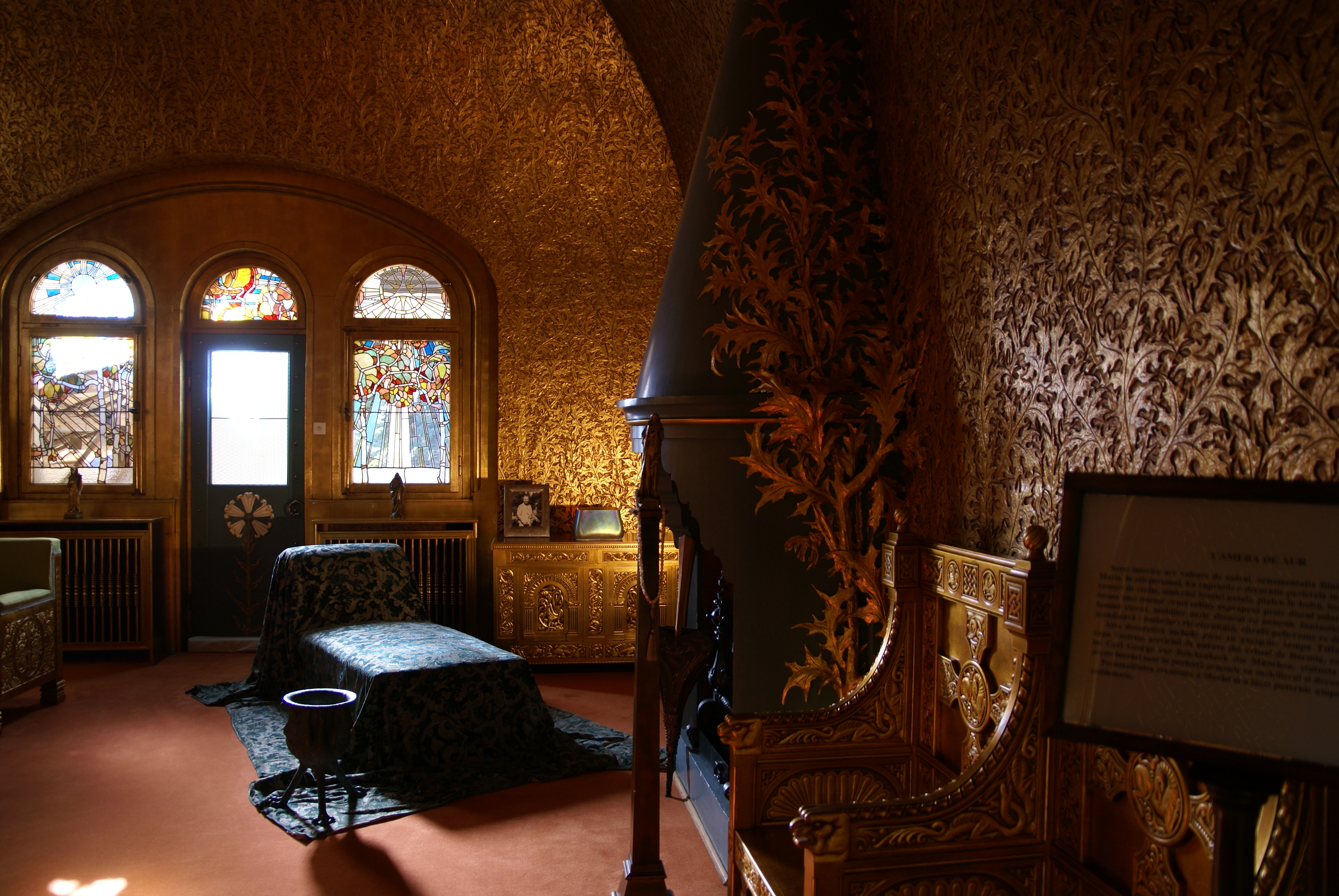 Castillo Pelisor - Sinaia - Rumania